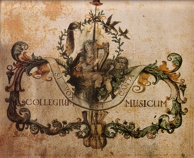 P. van de Wal, wapenboek (1663-1793, Rijksarchief Gelderland) van het Arnhemse muziekcollege Collegium Musicum Si Vox est Canta. De afbeelding stelt de legendarische dichter-zanger Orpheus voor in herdersgewaad, zijn staf met hoed in het gras gestoken, vogels fladderend om zijn hoofd, een leeuw aan zijn voeten, geheel mak door de betovering van het lierspel en stemgeluid